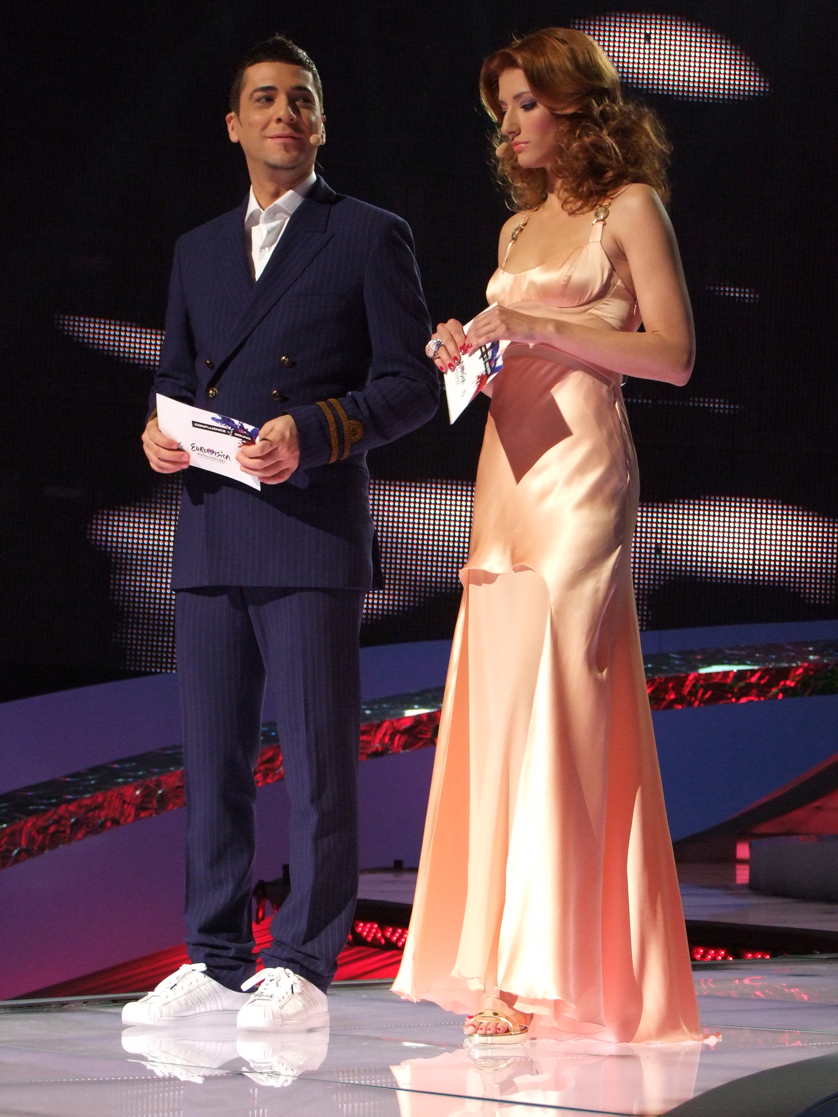 Semifinal 1 EUROVISION 2008